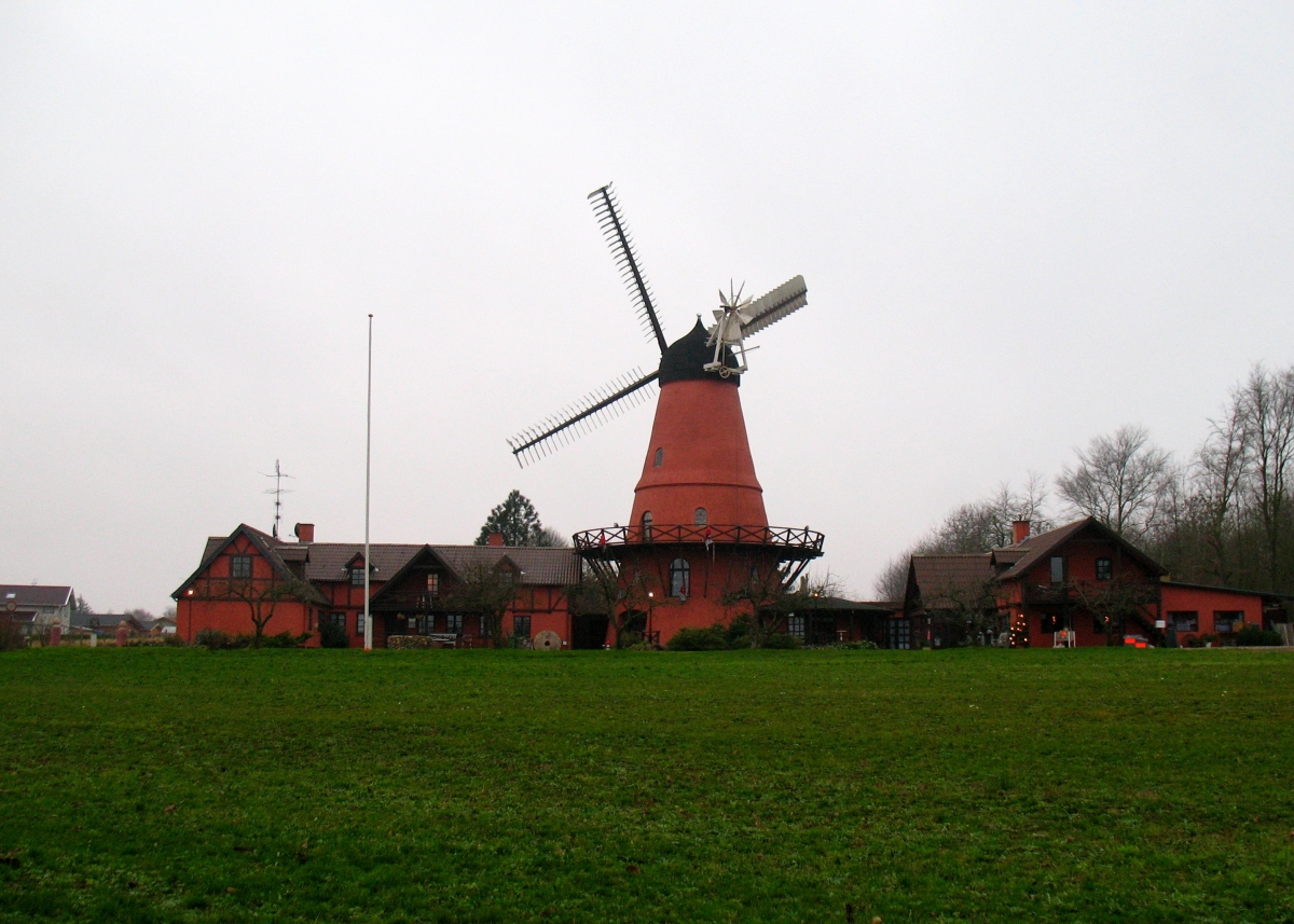 Åstrup Mølle, Svendborgvej 303, 5600 Faaborg Eget foto, Noorse Licentie: CC-BY-SA-3.0 Forminsket versjon for Wikipedia